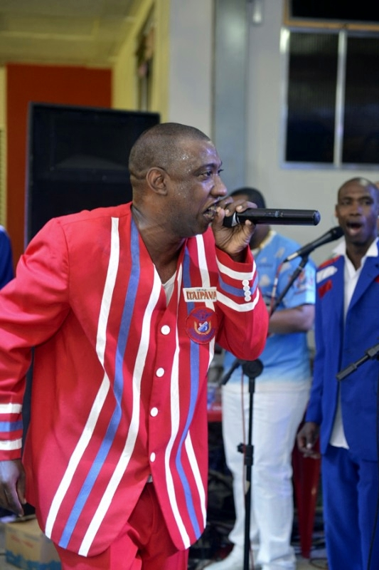 Final da disputa de samba-enredo na União da Ilha do Governador. Foto: Ricardo Almeida.